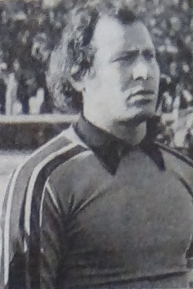 Assabah 1980